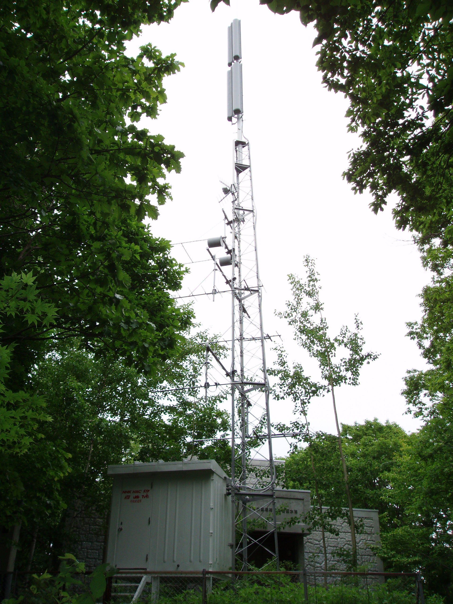 藻南中継局 NHK・HBC・STV・HTB・UHB・TVh送信設備